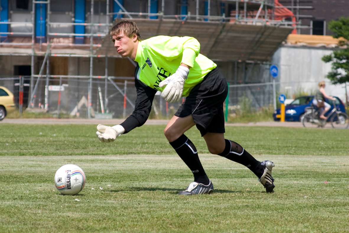 Diederik Bangma